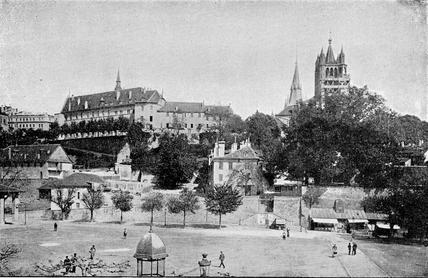 La place de la Riponne à Lausanne dans la seconde moitié du XIX ème siècle, avant la construction du Palais de Rumine.